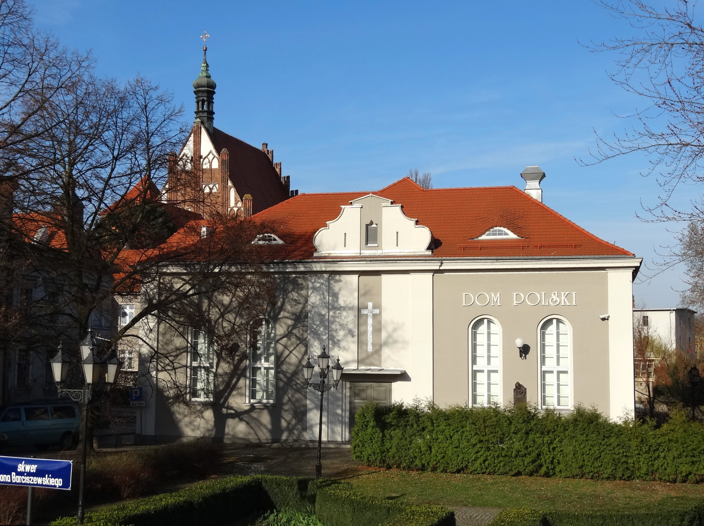 Instytut Kultury - Dom Polski w Bydgoszczy przy ul. Grodzkiej